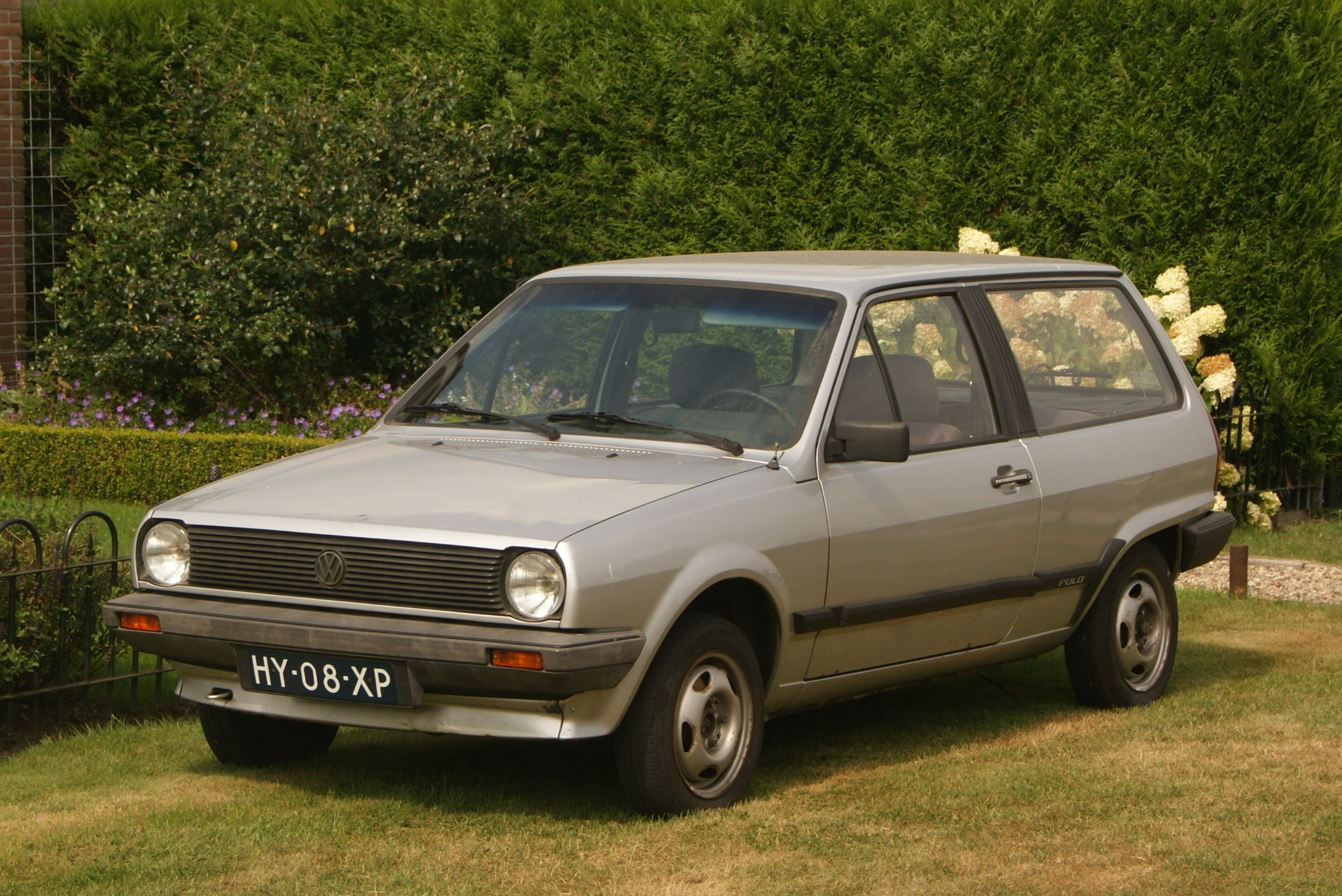 HY-08-XP